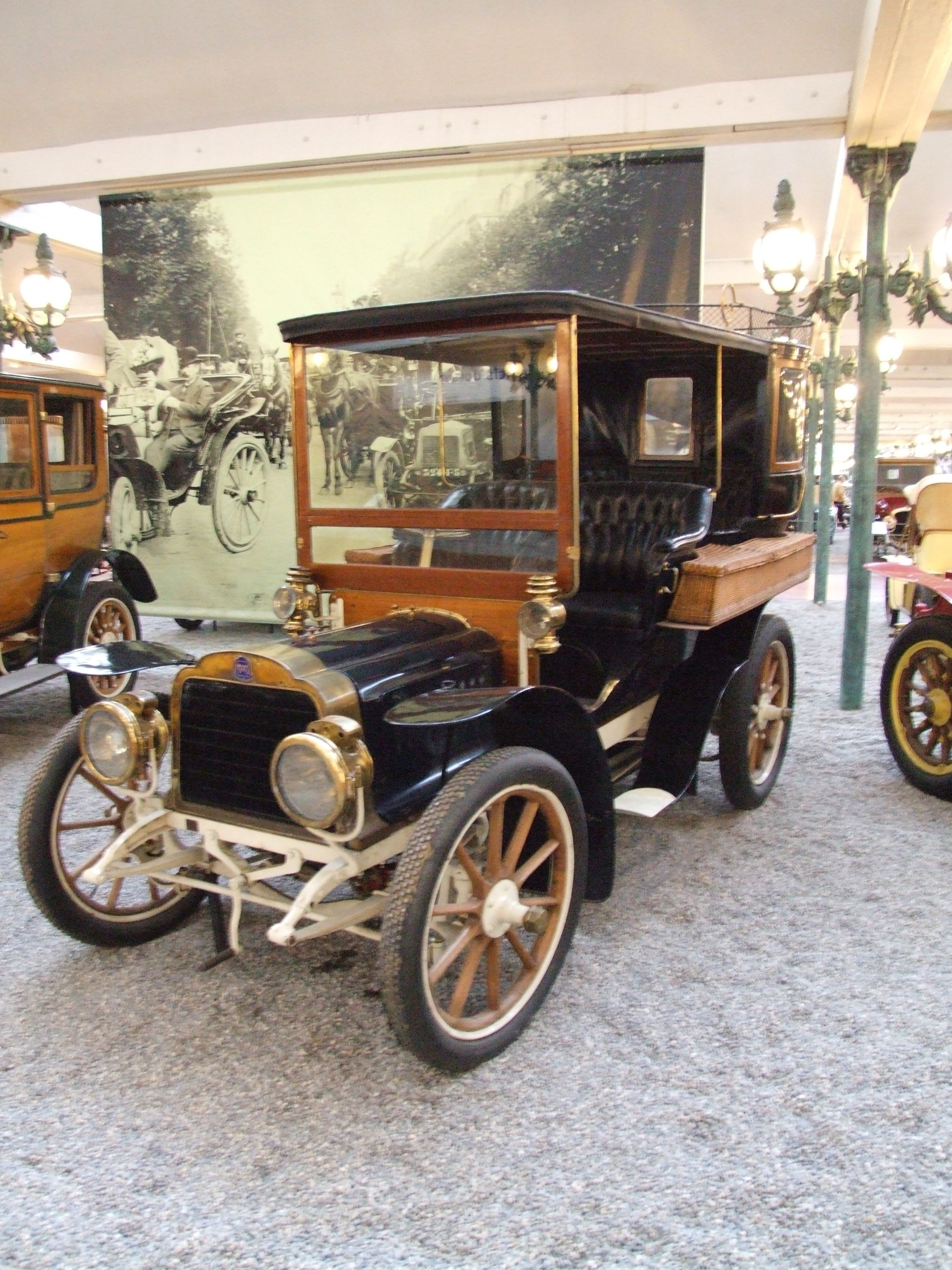 Mors 8/10 CV Type N Tonneau fermé (caractérisée par l'accès des passagers par une unique portière arrière), Carrosserie J. Rothschild & fils, 1910, 4 Zylinder, 1809 ccm, 60 km/h, Cité de l’Automobile – Musée National – Collection Schlumpf, Mülhausen, Frankreich